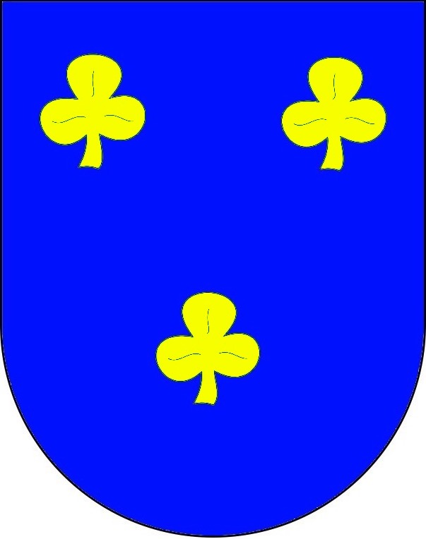 Blason des armoiries de la famille De Brosses. D'azur à trois trèfles d'or posés deux sur un.